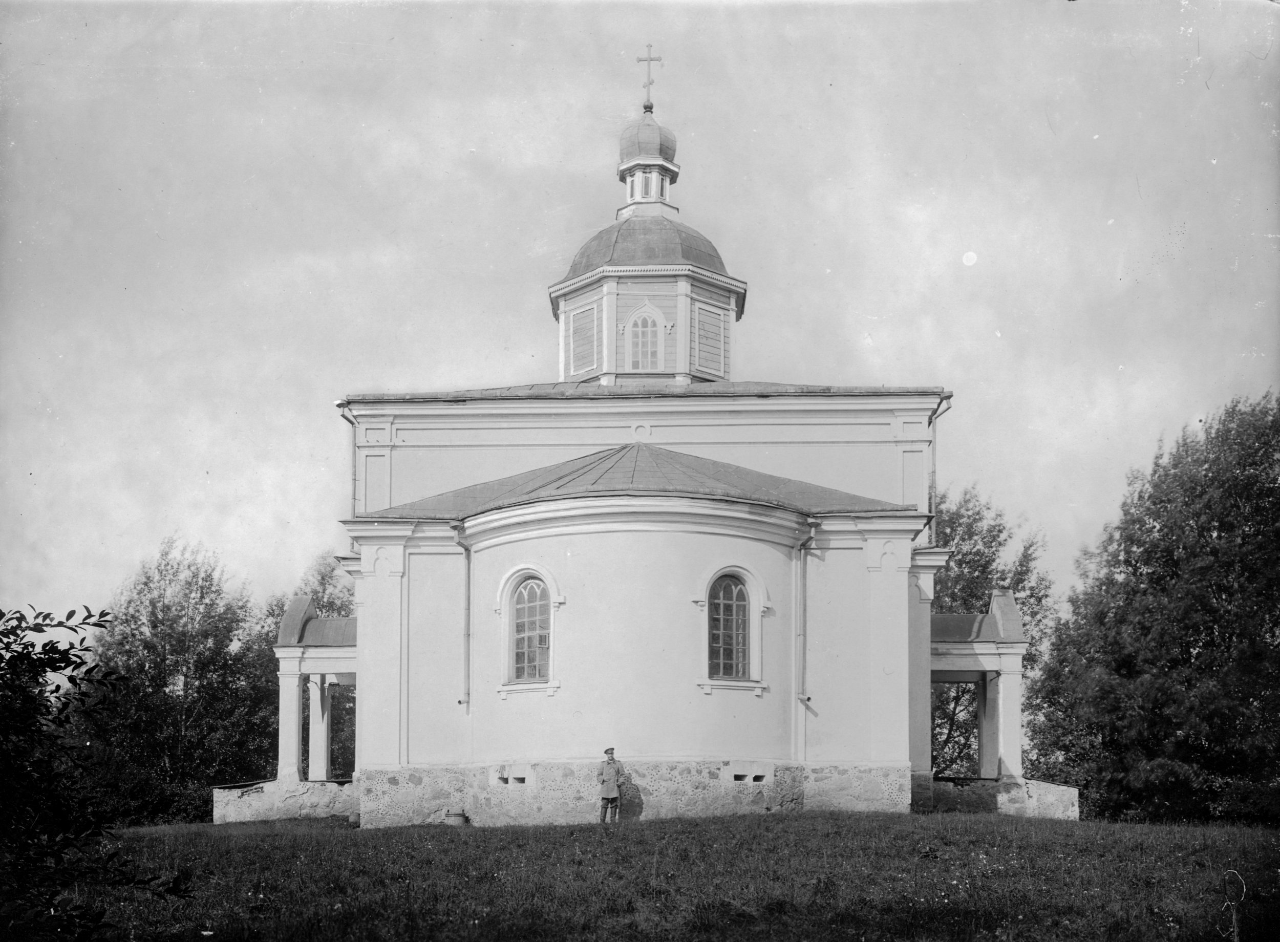 Беларуская (тарашкевіца): Карэлічы (Kareličy), пляц Царкоўны (plac Carkoŭny). Петрапаўлаўская царква-мураўёўка